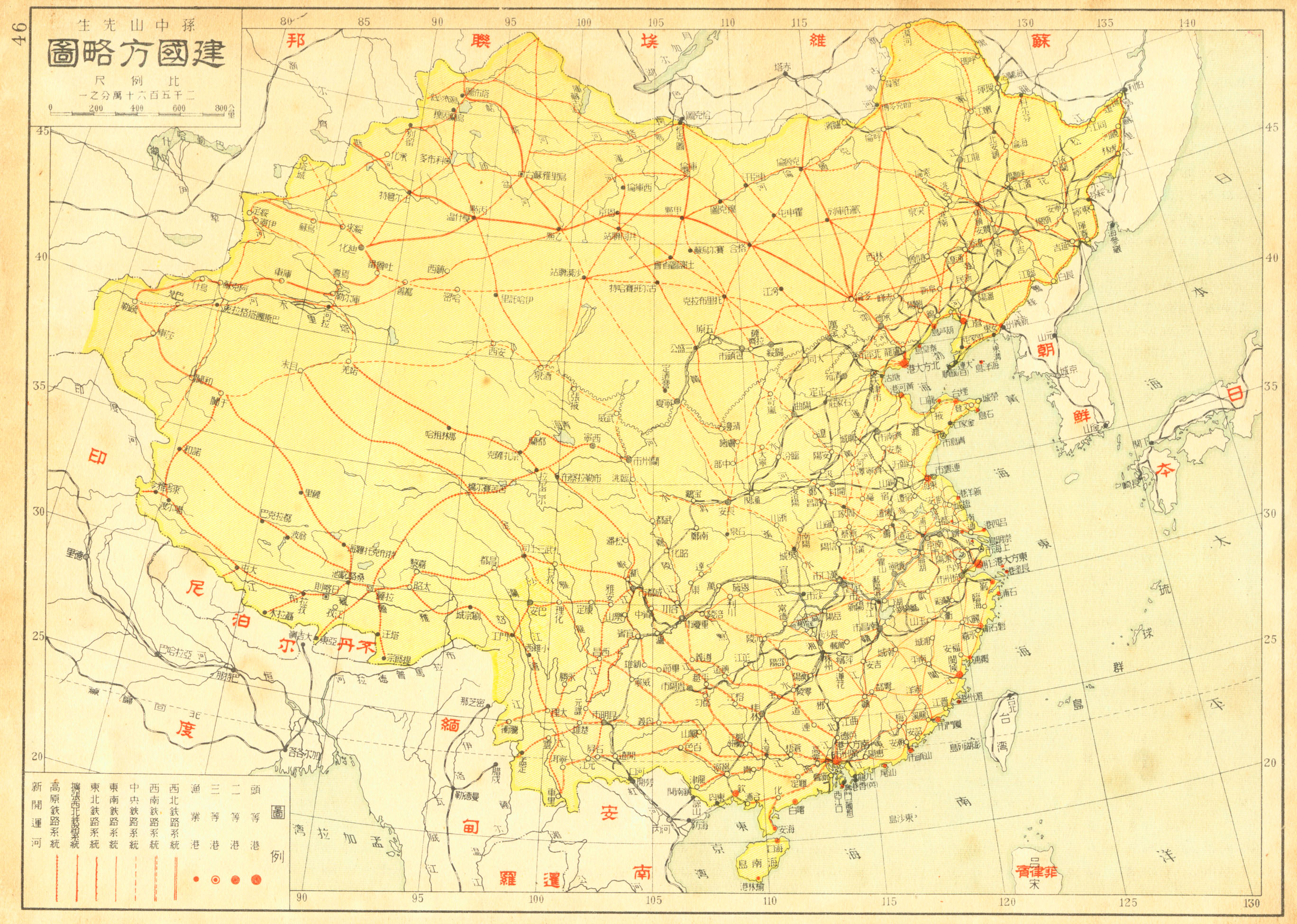 孫中山先生建國方略圖